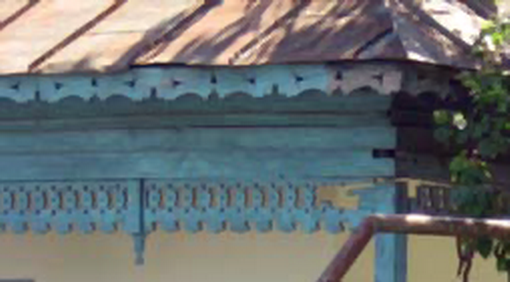 Detaliu de realizare a "florăriei" ornamentale de lemn la o casă din comuna Bordei Verde